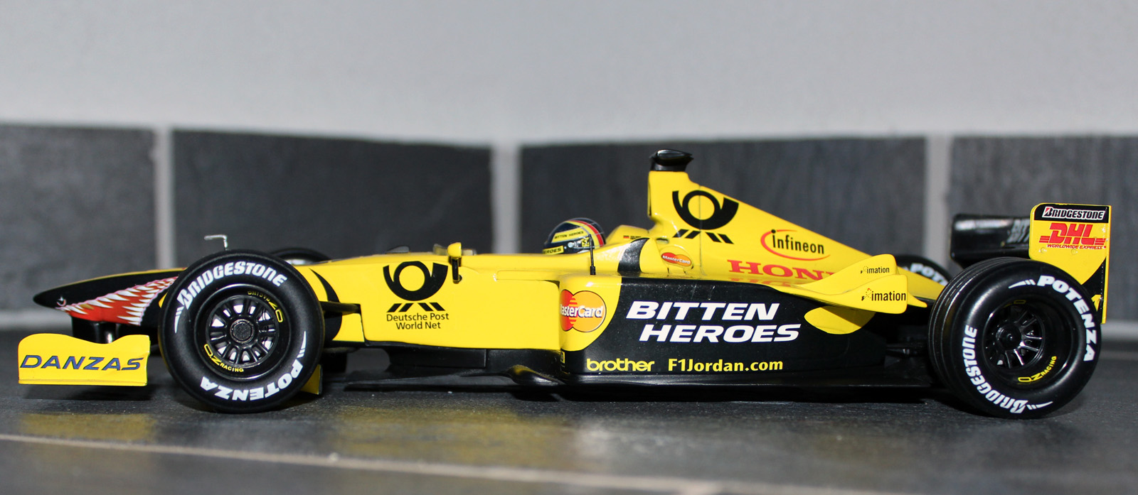 Modell Jordan EJ10